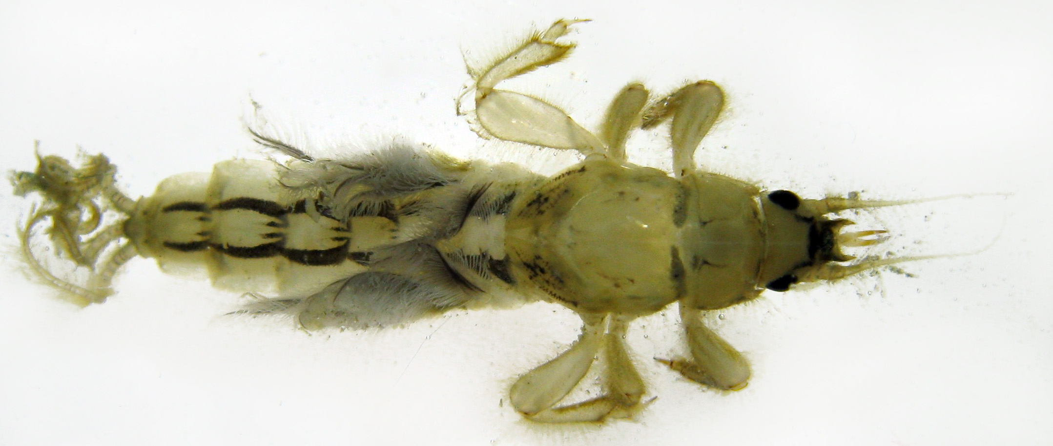 Larve d'éphémère (Ephemera vulgata) Canal de Savière, Savoie